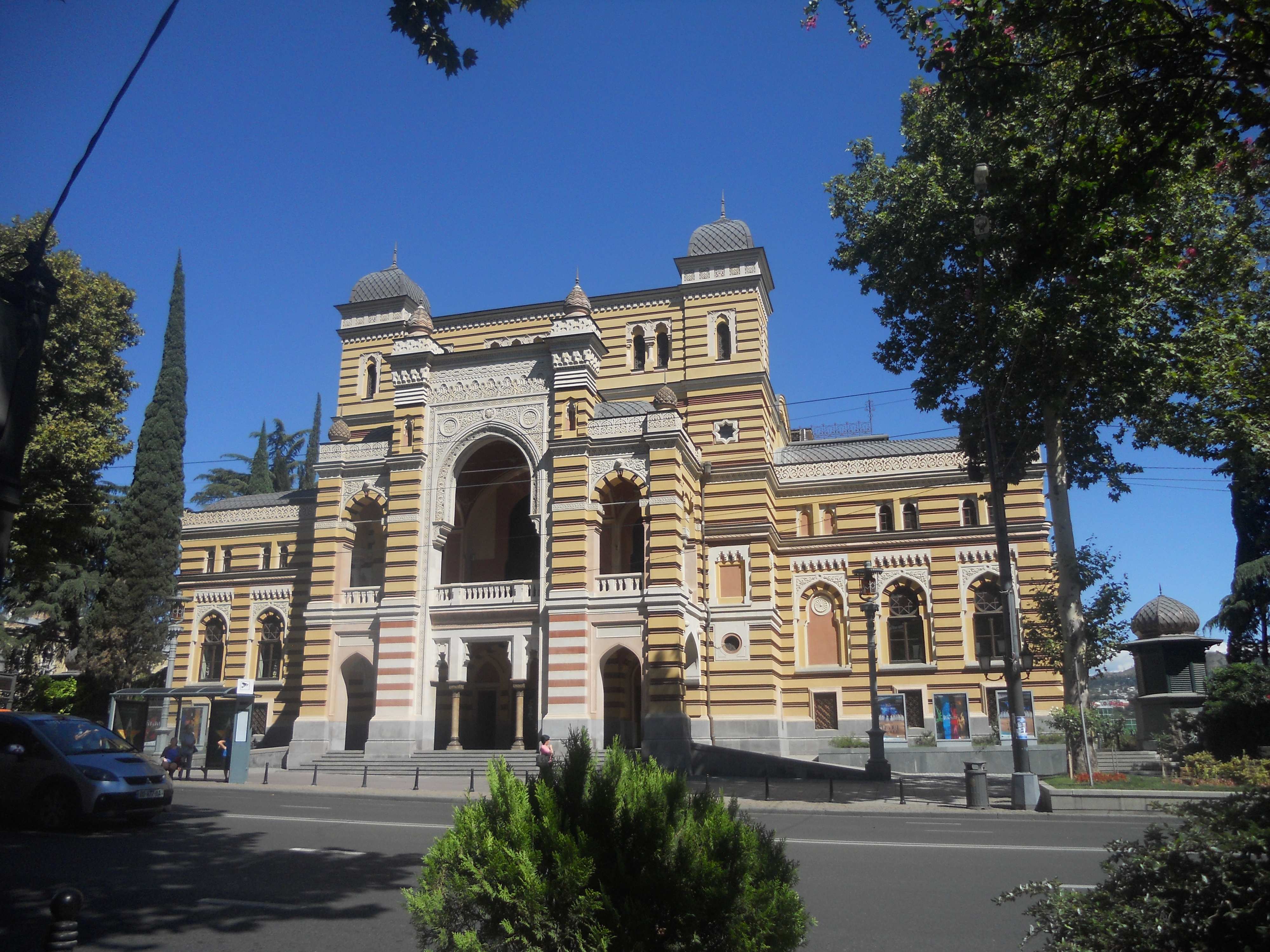 ზაქარია ფალიაშვილის სახელობის სახელმწიფო ოპერისა და ბალეტის თეატრი